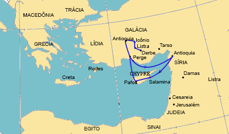 Mapa da 1ª viagem de Paulo